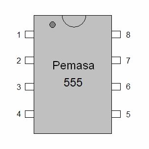 Gambarajah blok bagi pemasa 555 dengan nombor-nombor pin